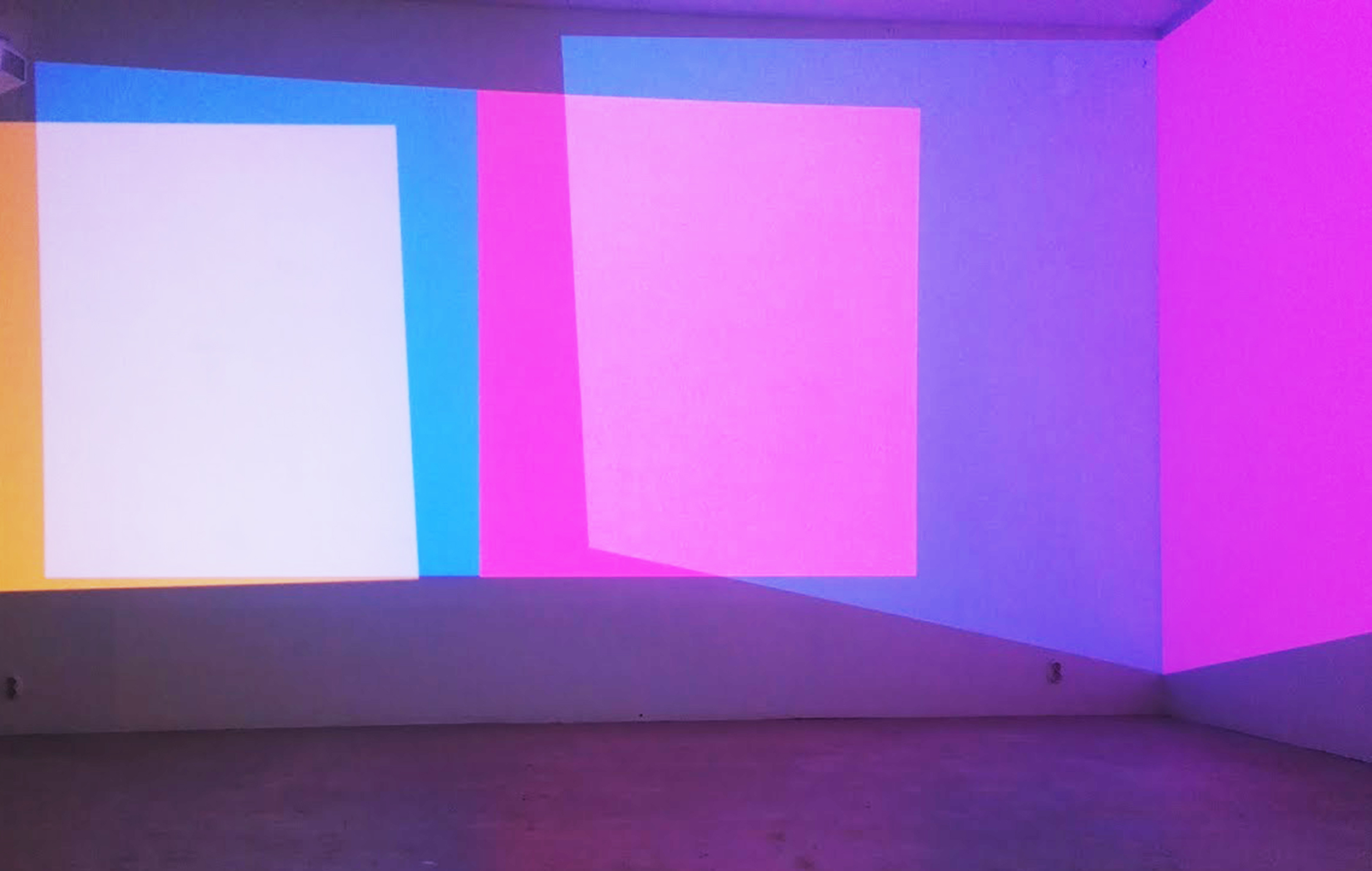 Juan Kasari installation Absence